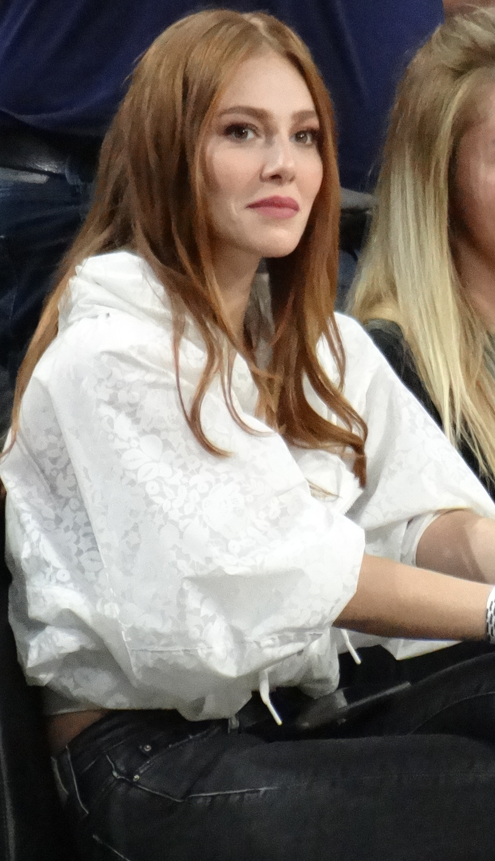 Elçin Sangu 2015 October